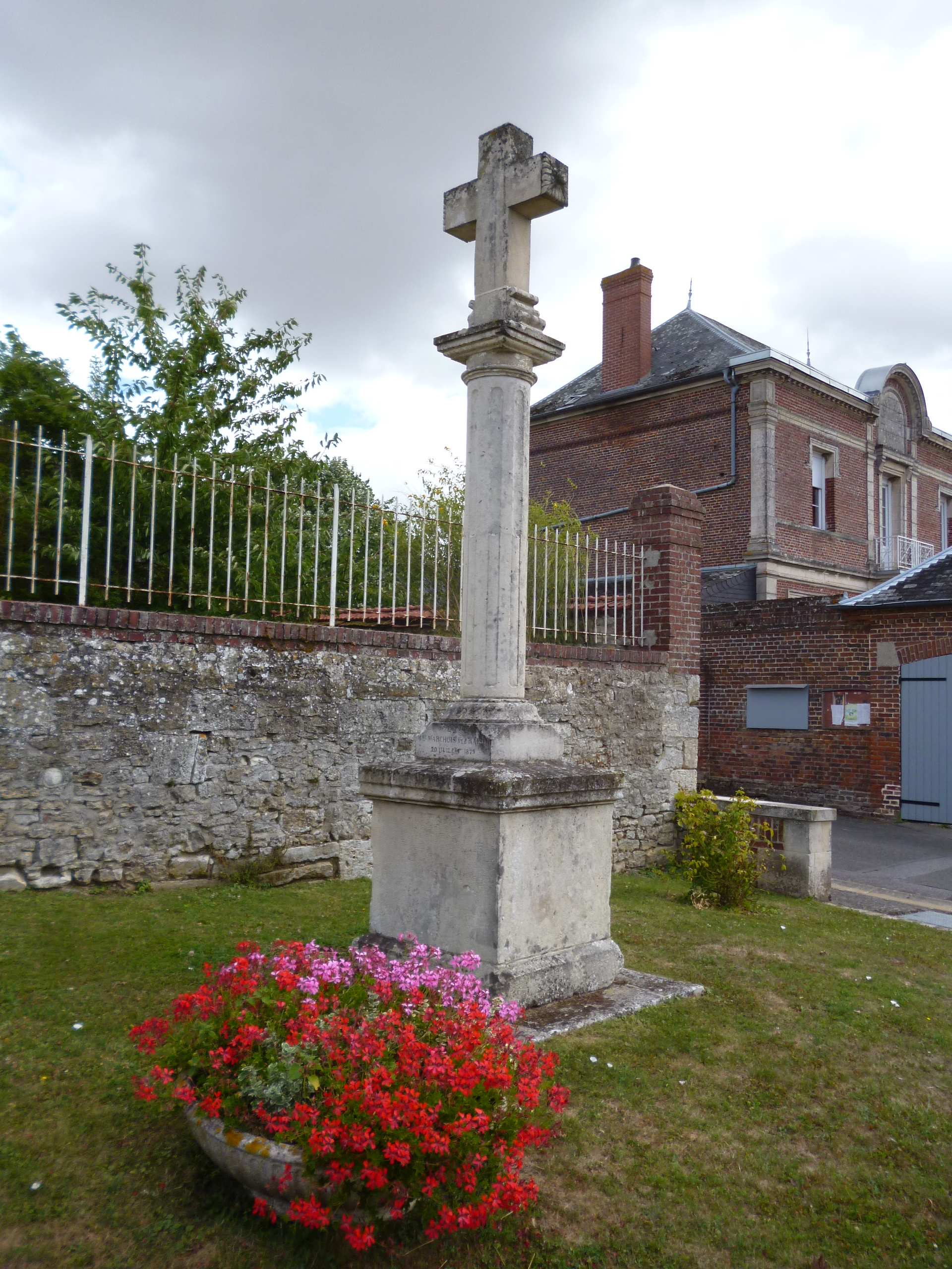 Calvaire situé sur la commune d'Angivillers (Oise), avec la mairie en arrière-plan.